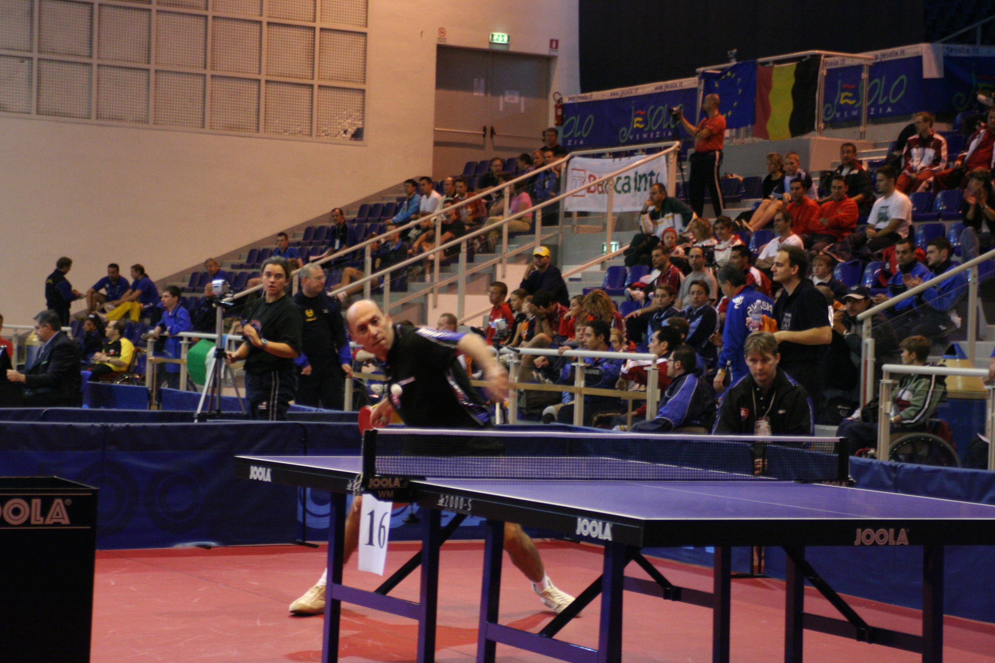 Ladislav Gáspár, slovenský paralympionik desaťročiaLadislav Gaspar (Slovakia)